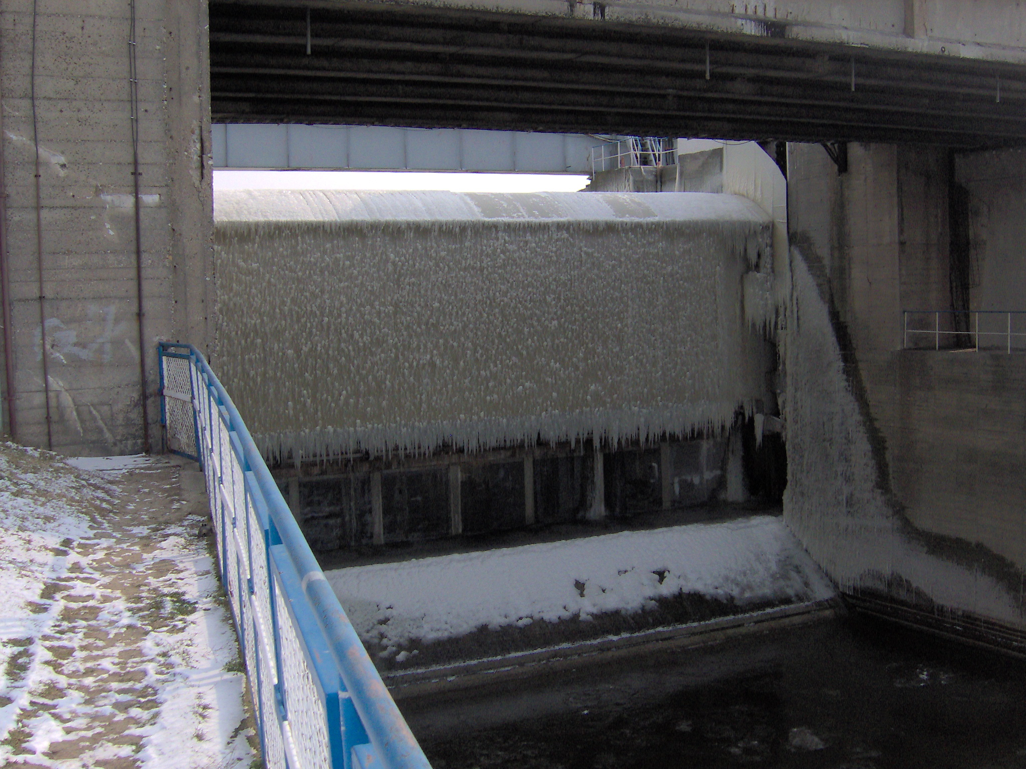 Zapora wodna na Wiśle i okolice (2007 r.)